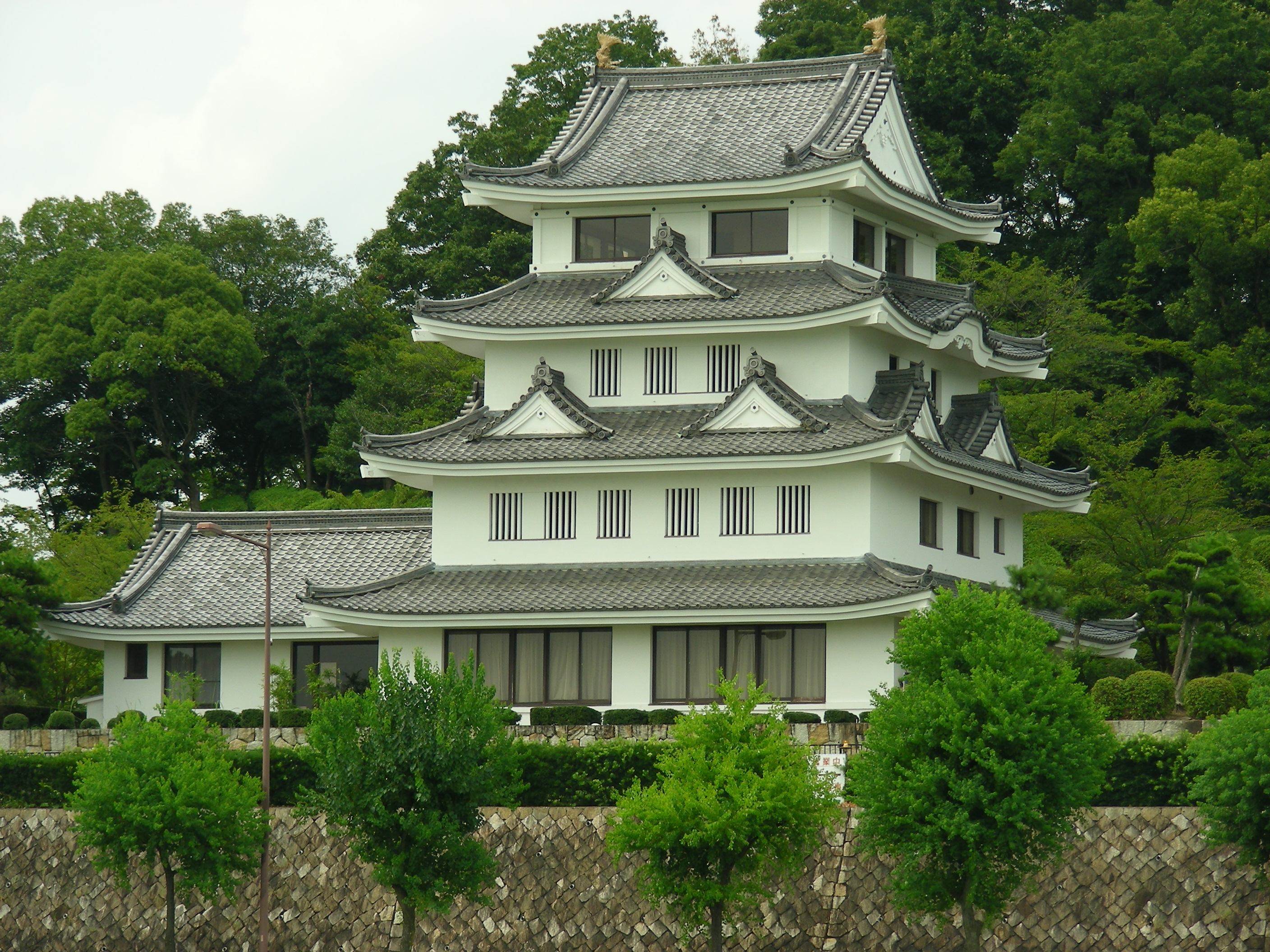 旭城レストハウス